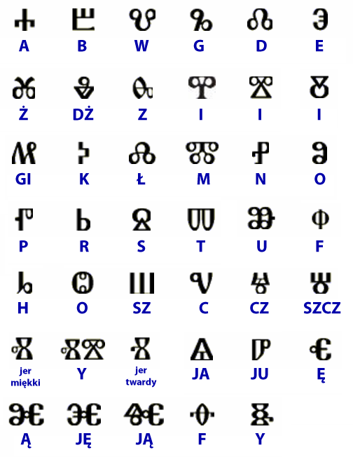 Autor: Andrzej Barabasz (Chepry) (wykorzystano grafikę User:Harry)